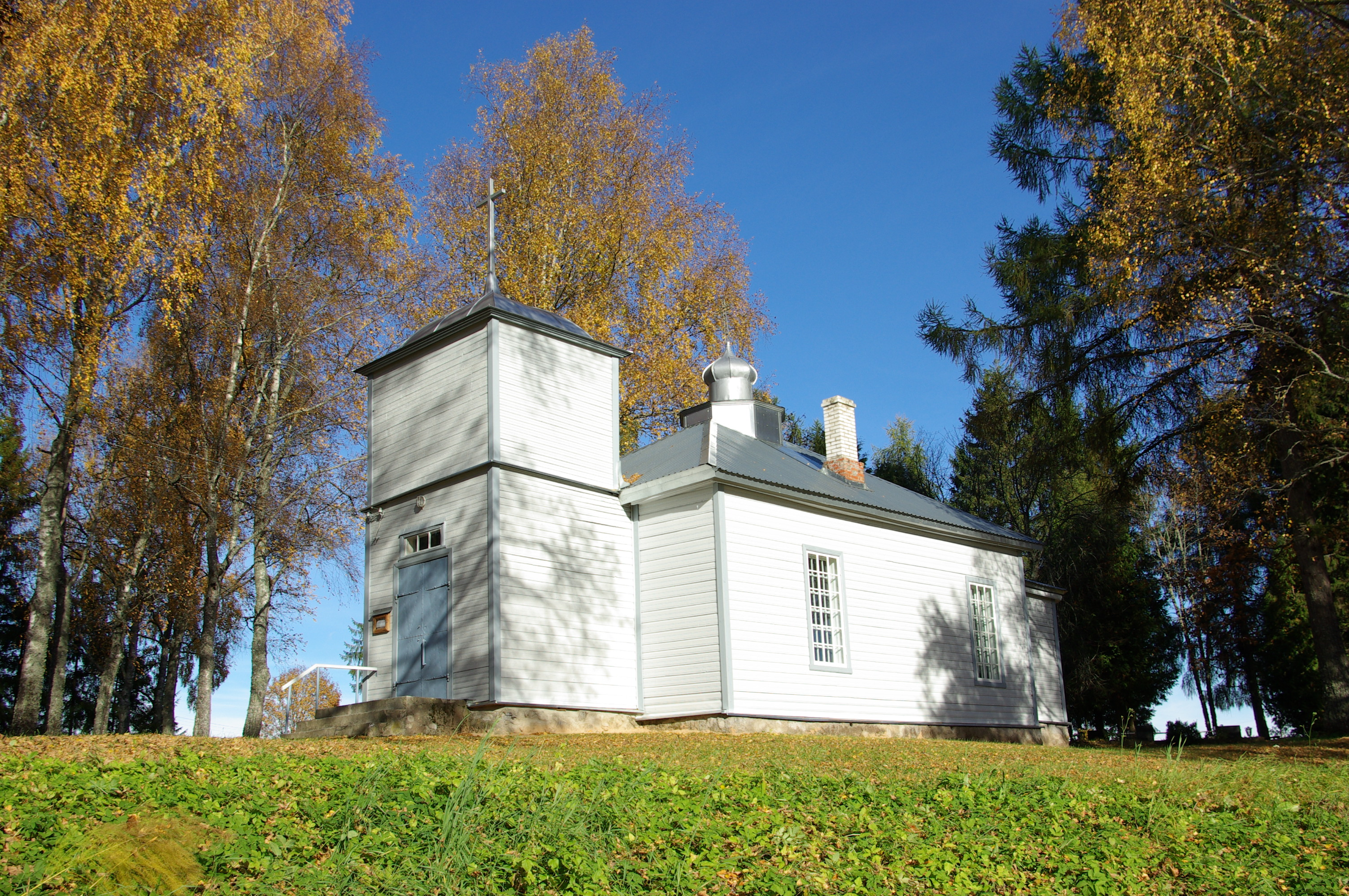 Miikse kirik